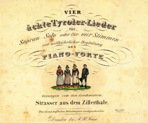 Deckblatt des Drucks „Vier ächte Tyroler-Lieder“, der auch den Erstdruck von „Stille Nacht, heilige Nacht“ enthält.